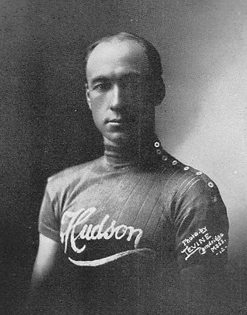 Nat Butler, US-amerikanischer Radrennfahrer